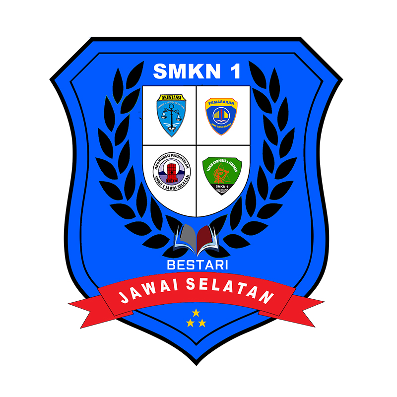 Logo SMKN 1 Jawai Selatan